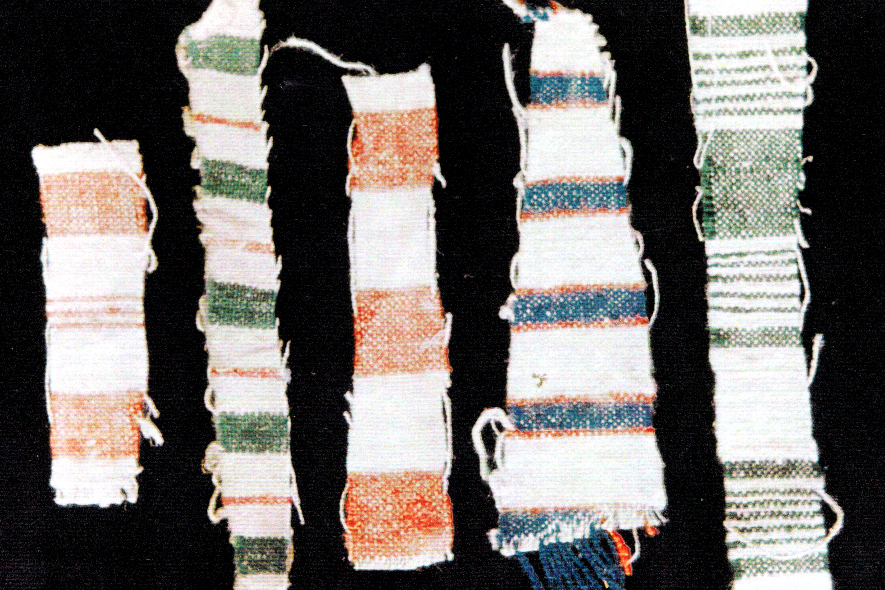 Voorbeelden van Hilversum streep weefwerk.